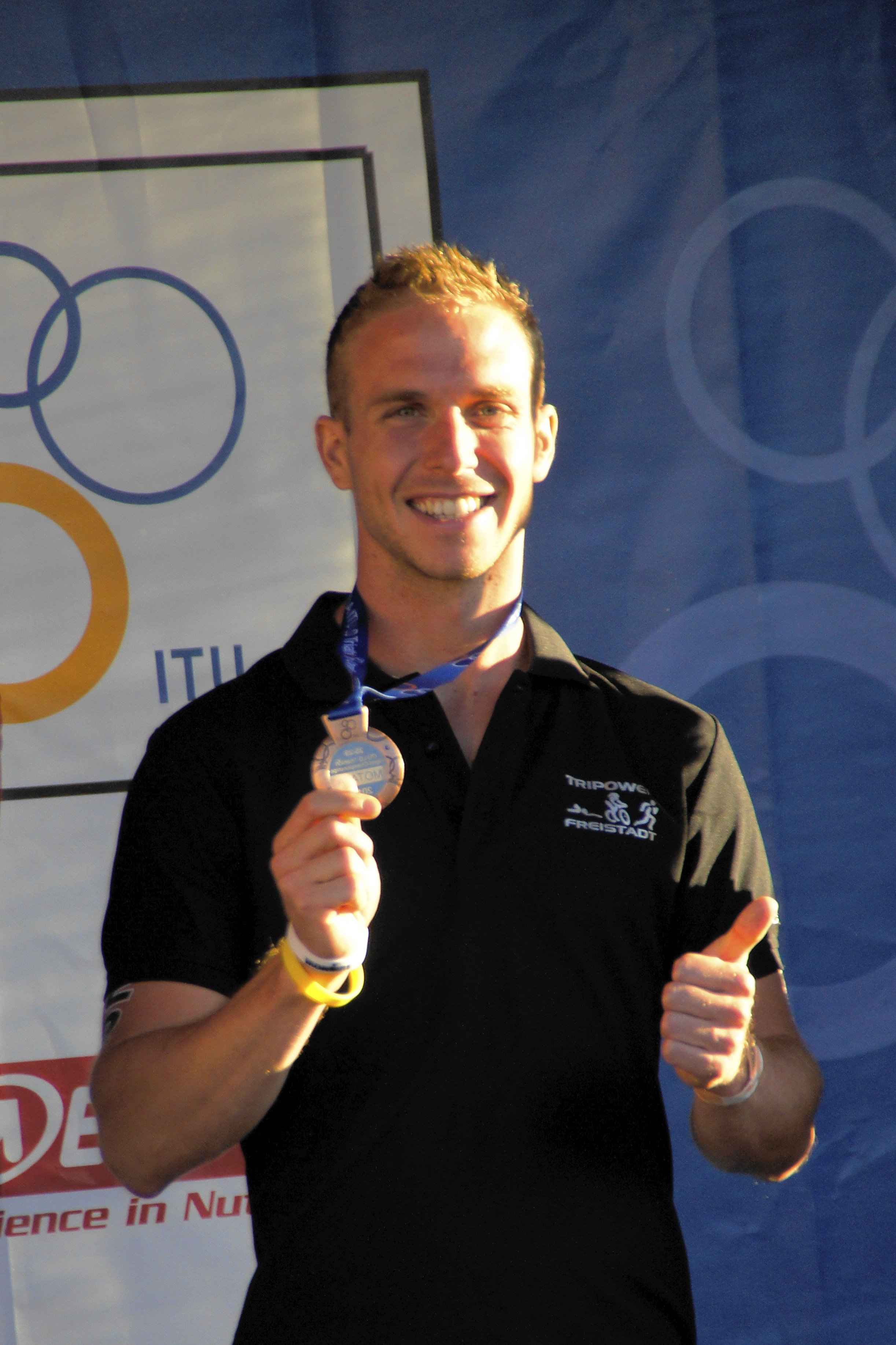 Georg Horner bei der ITU Langdistanz WM am 27. Juni 2015 in Motala / Schweden